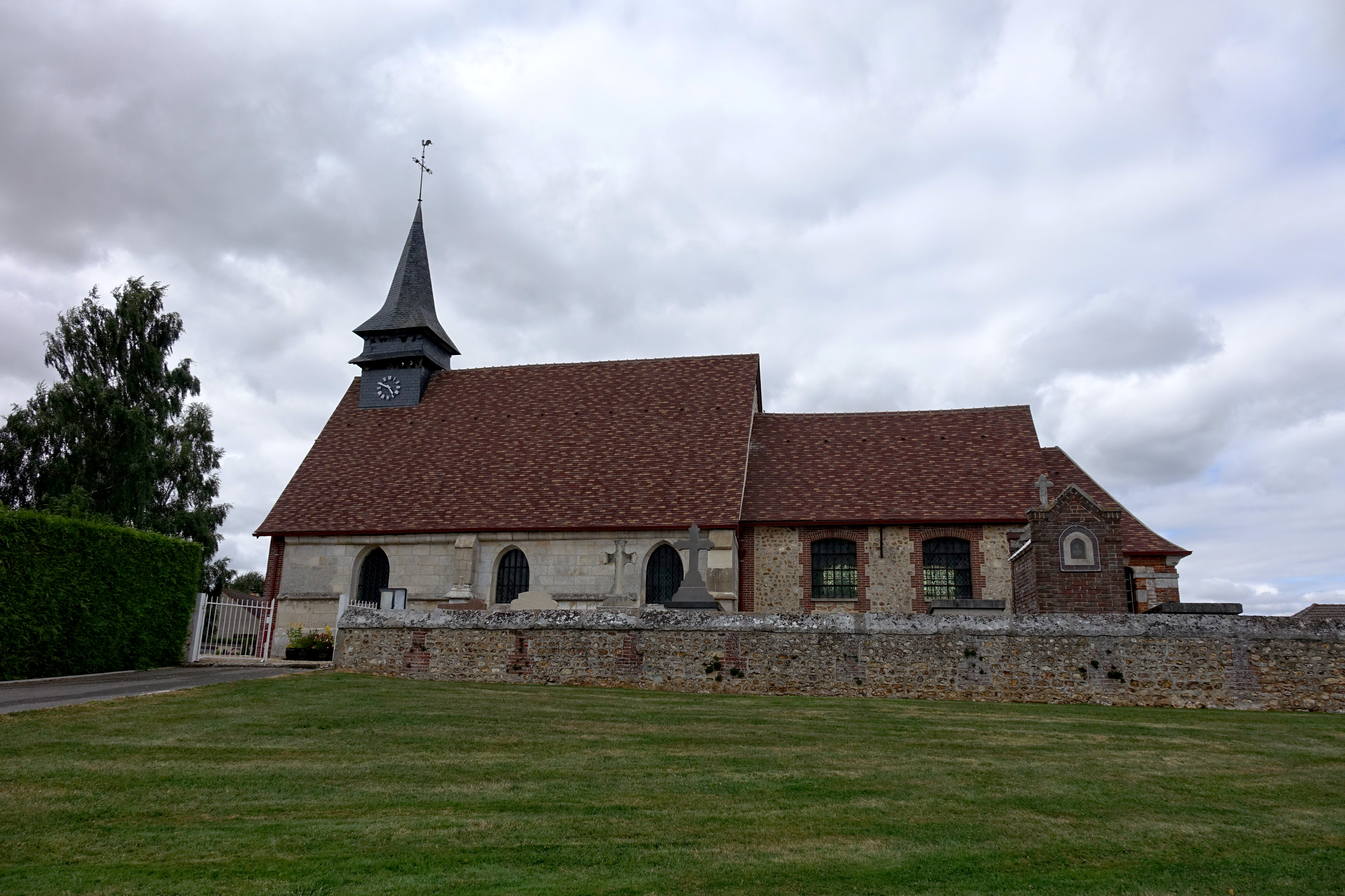 Église Saint-Léger de Bernienville, Eure, France